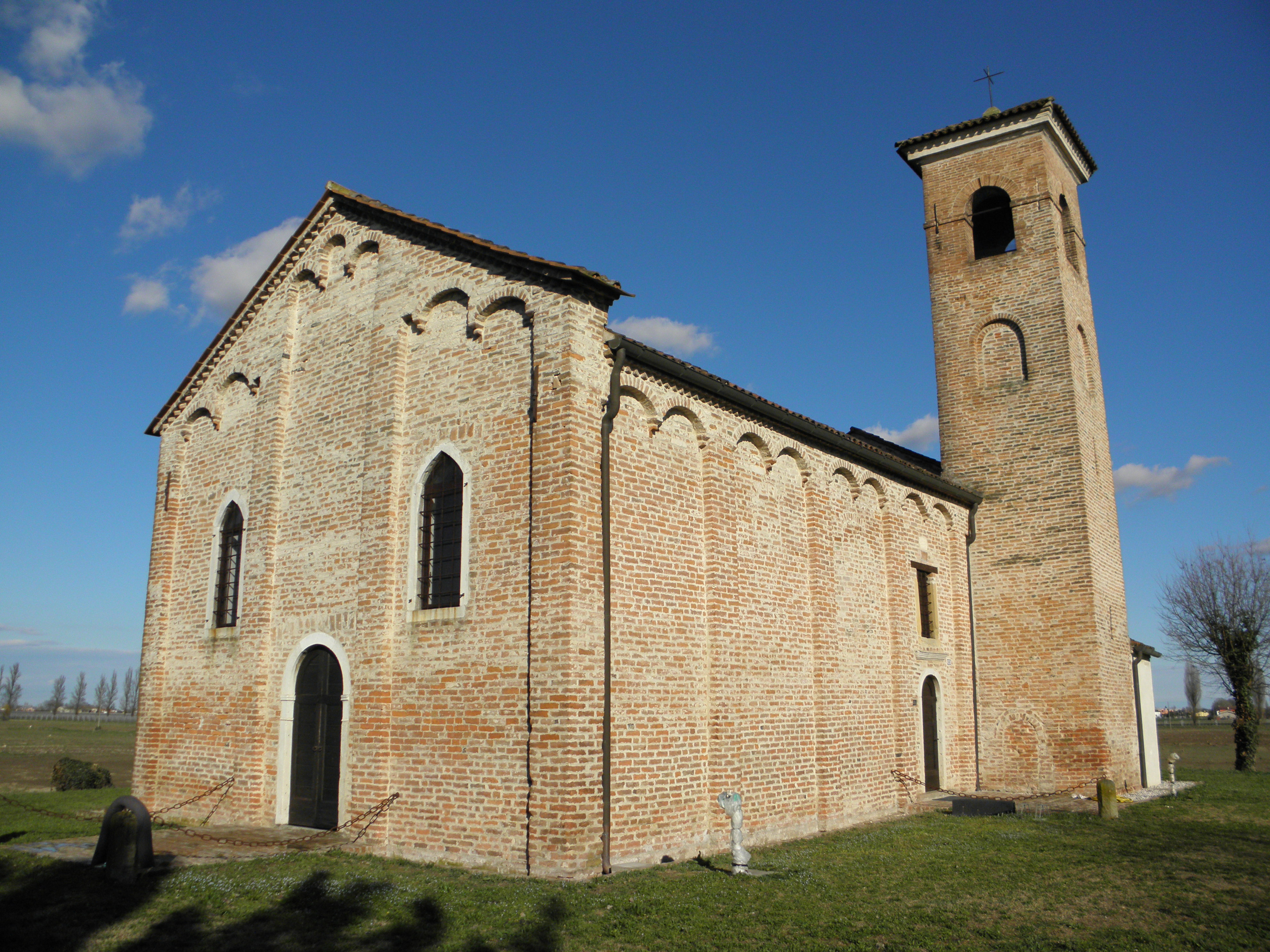 Bagnoletto, località di Bagnoli di Sopra: l'oratorio di San Daniele, già parrocchiale, risalente al XIII secolo.